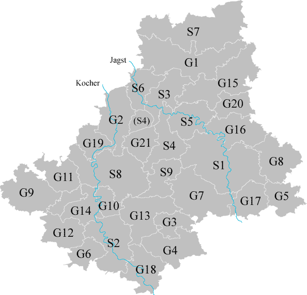 A Map of Landkreis Schwäbisch Hall, Germany. "S" means "Städte", S1; Crailsheim, S2; Gaildorf, S3; Gerabronn, S4; Ilshofen, S5; Kirchberg an der Jagst, S6; Langenburg, S7; Schrozberg, S8; Schwäbisch Hall, S9; Vellberg. "G" means "Gemeinden", G1; Blaufelden, G2; Braunsbach, G3; Bühlertann, G4; Bühlerzell, G5; Fichtenau, G6; Fichtenberg, G7; Frankenhardt, G8; Kreßberg, G9; Mainhardt, G10; Michelbach an der Bilz, G11; Michelfeld, G12; Oberrot, G13; Obersontheim, G14; Rosengarten, G15; Rot am See, G16; Satteldorf, G17; Stimpfach, G18; Sulzbach-Laufen, G19; Untermünkheim, G20; Wallhausen, G21; Wolpertshausen.